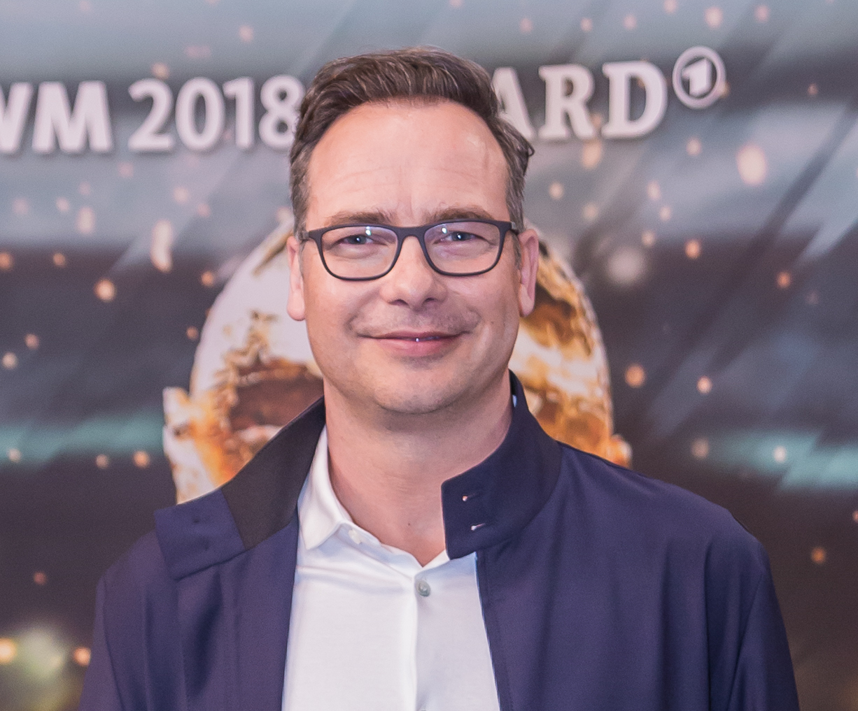 Matthias Opdenhövel, Sportschau-Moderator ARD